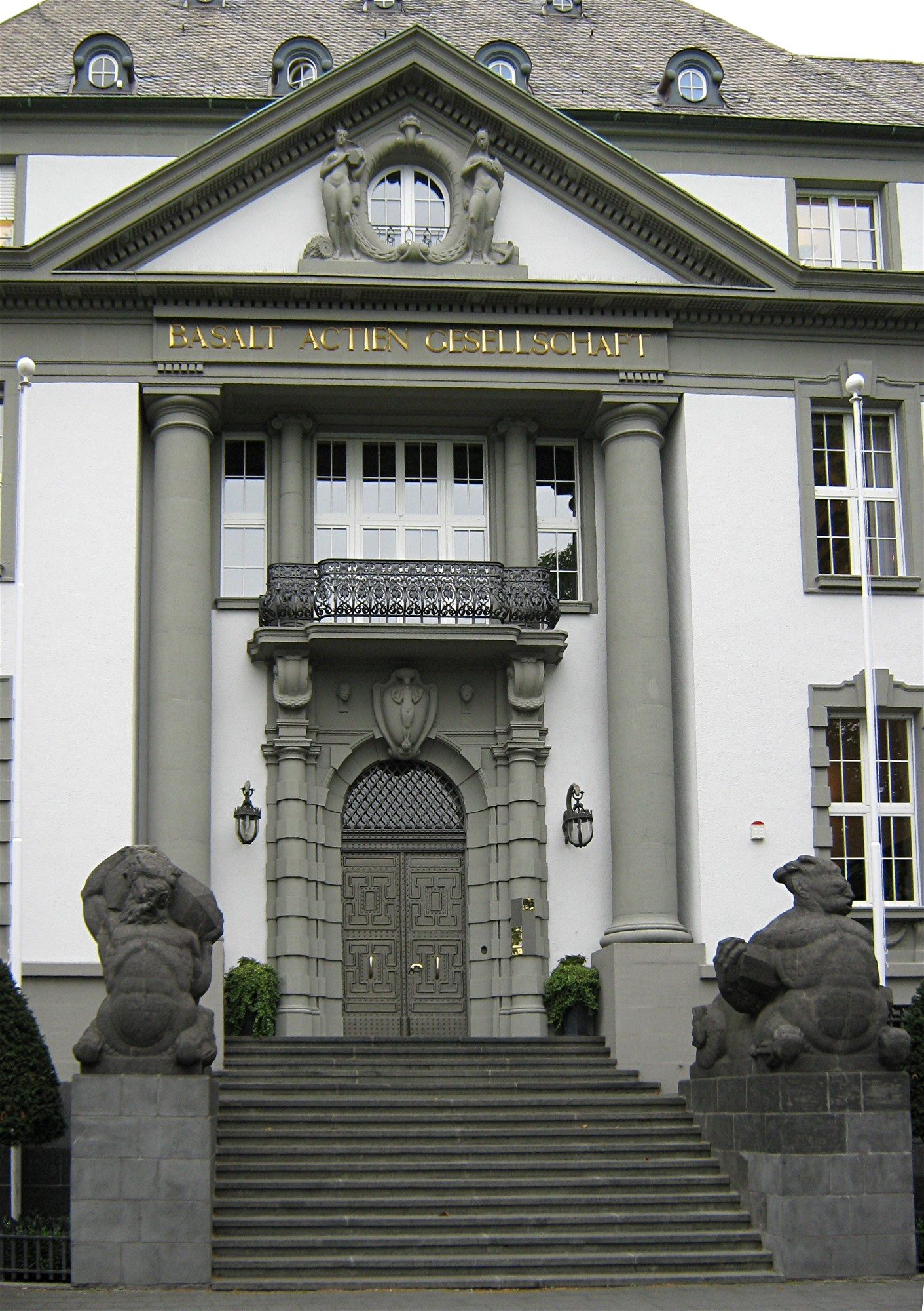 Verwaltungsgebäude der Basalt AG in Linz am Rhein